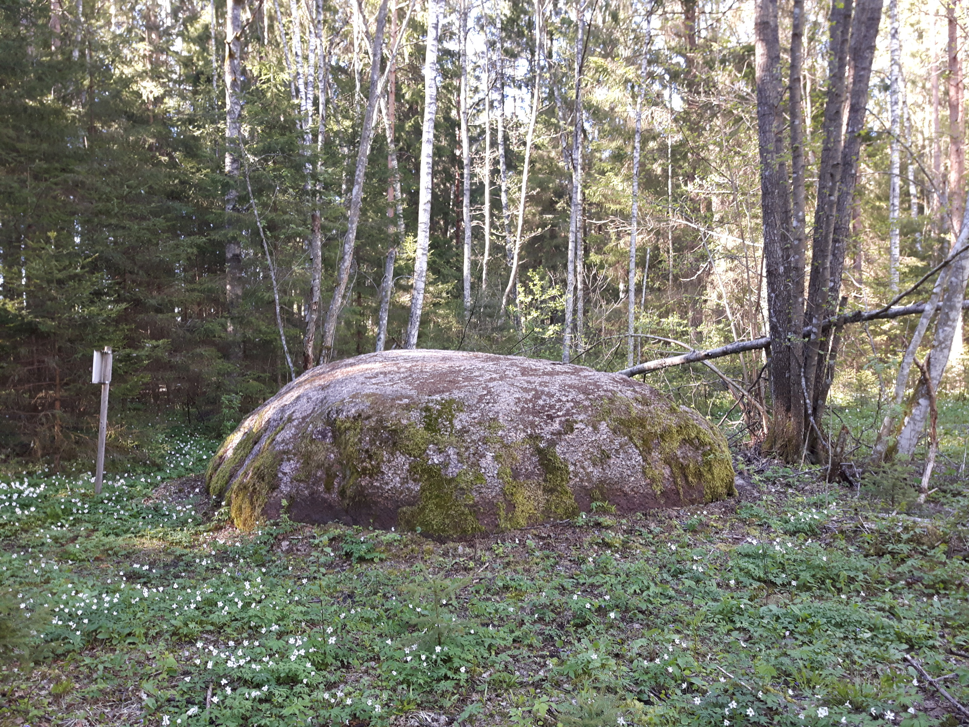 Linnamäe rändrahn 2020. aasta kevadel